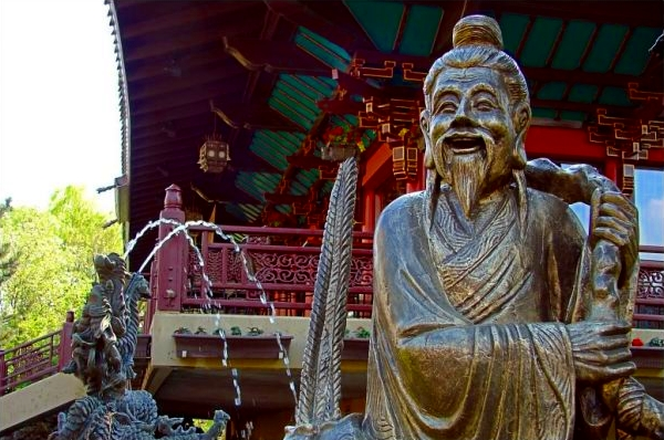 Ein Dekorationsdetail aus dem Chinesischen Teil des Phantasialands, Germany